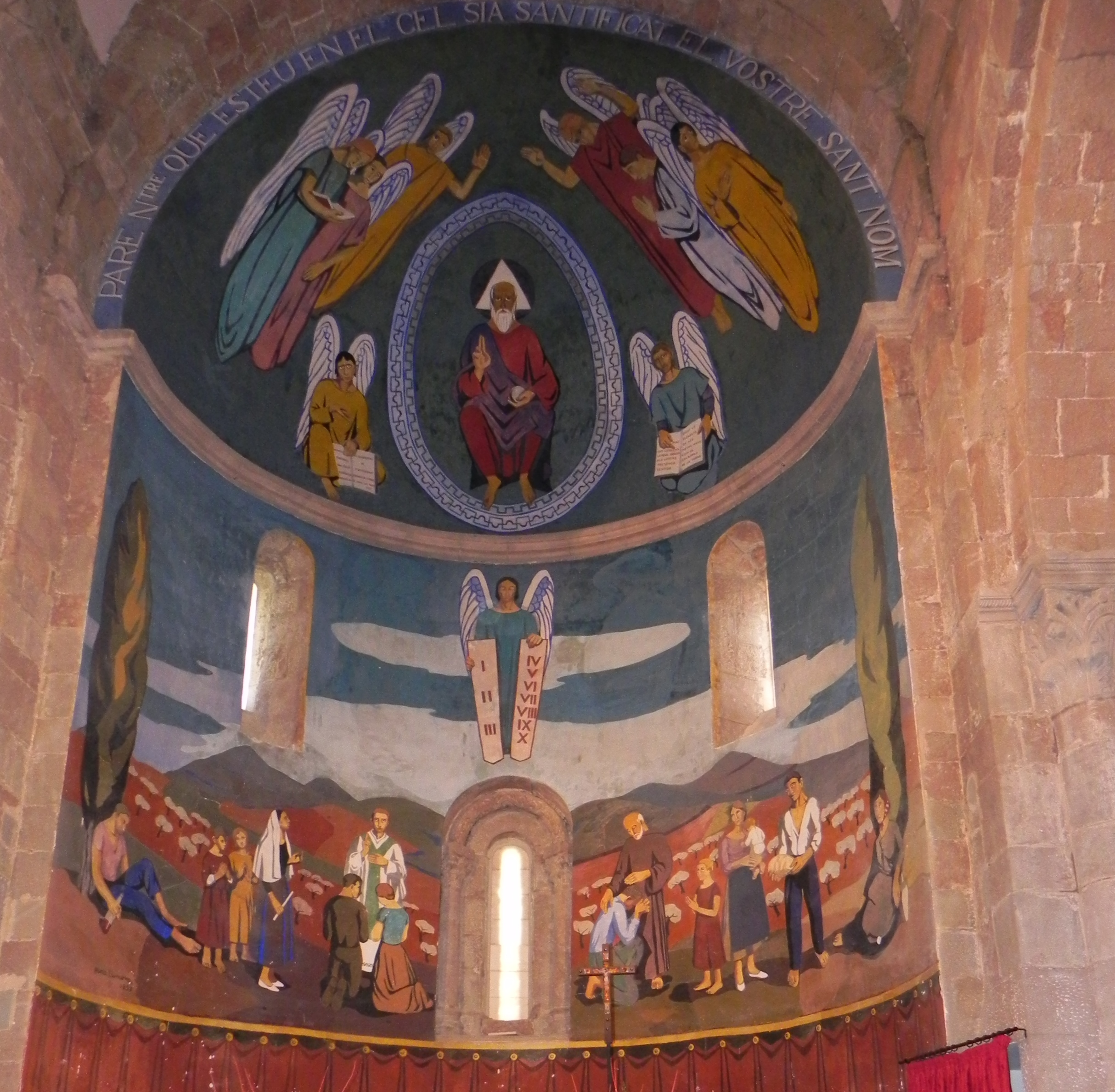 Església de Sant Joan les Fonts